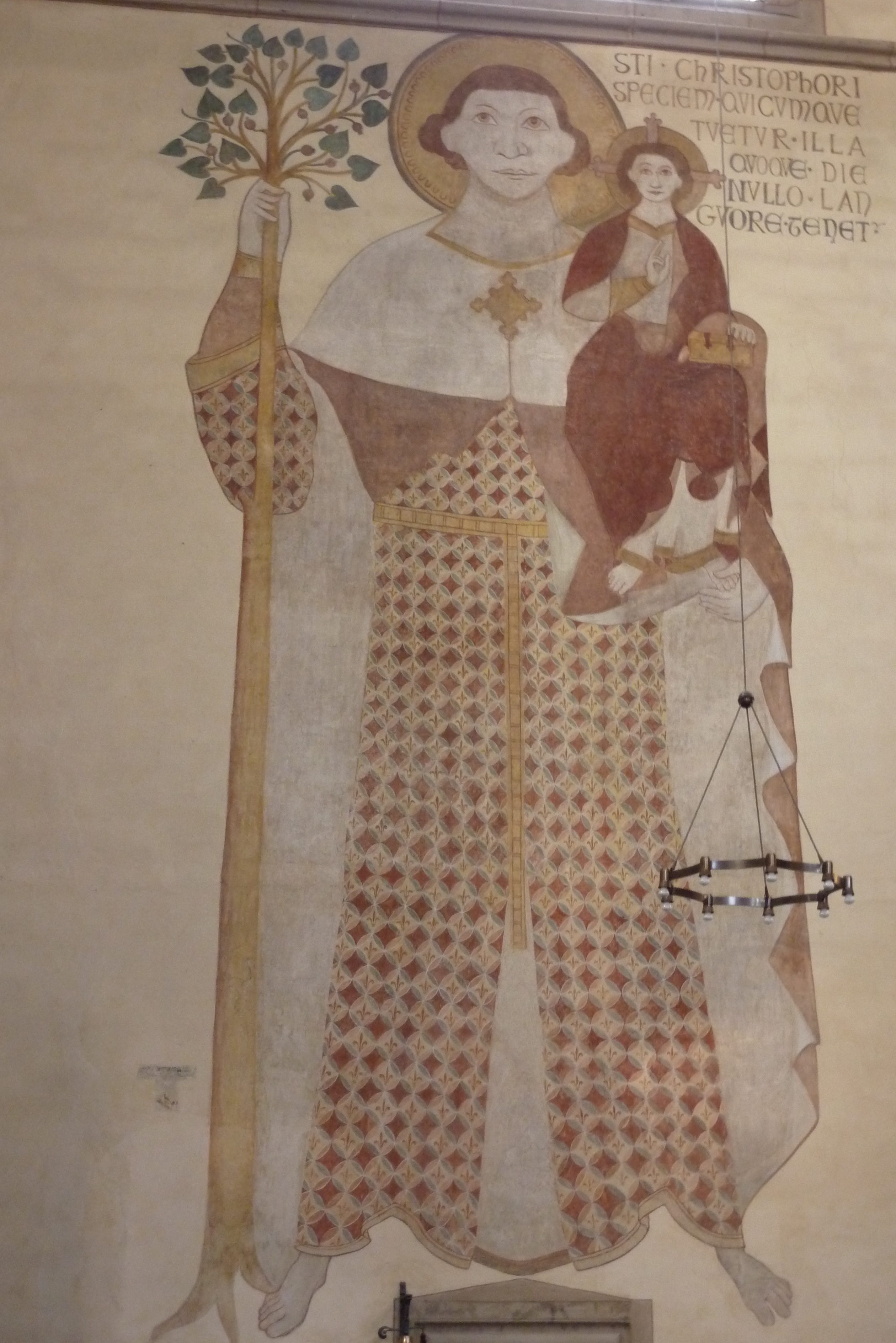 Christopherus, Wandmalerei um 1280